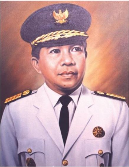 Abd. Moes Hasan sebagai Gubernur Kalimatan Timur